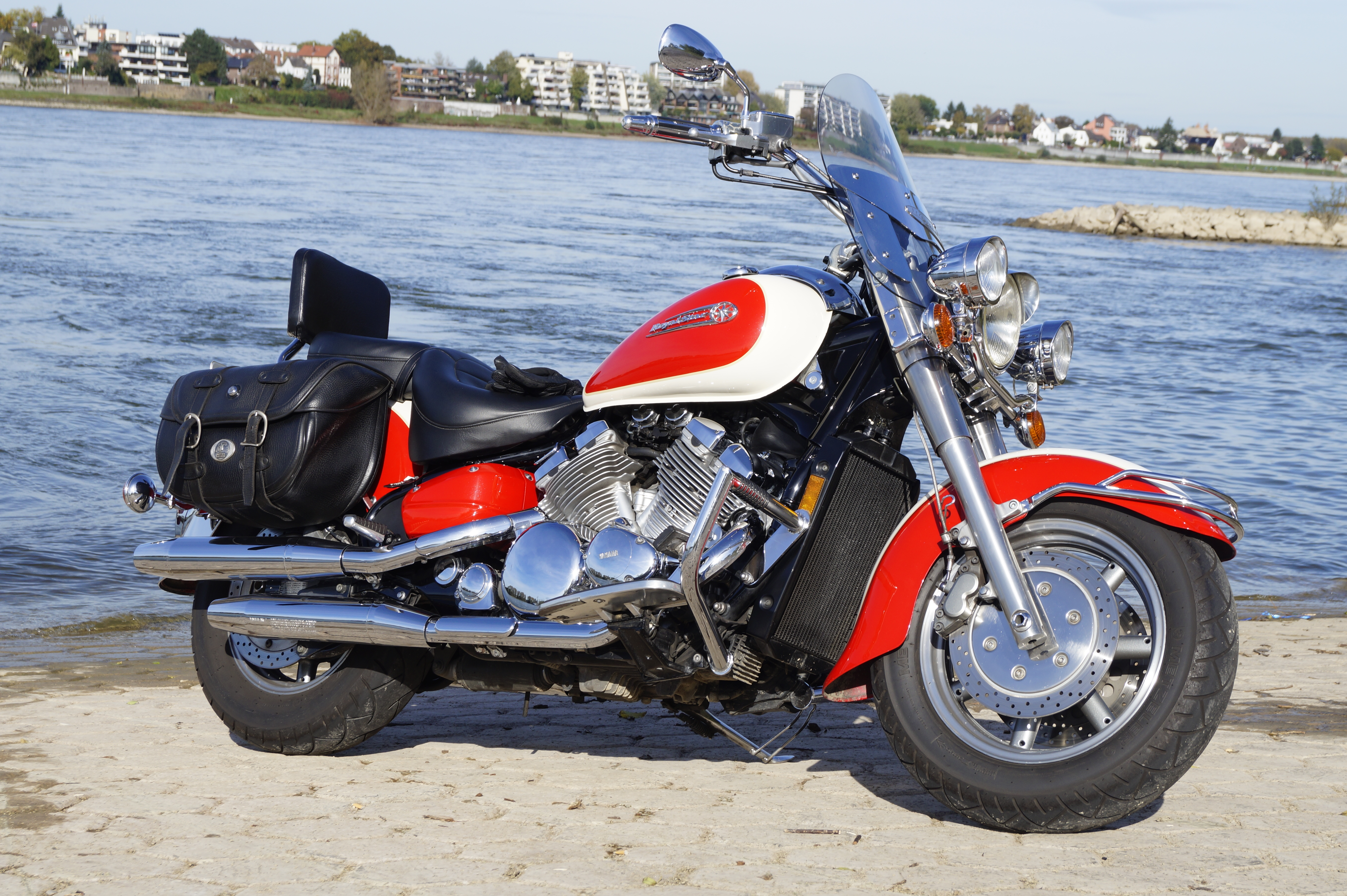 Yamaha XVZ 1300 Royal Star, Bj. 1996